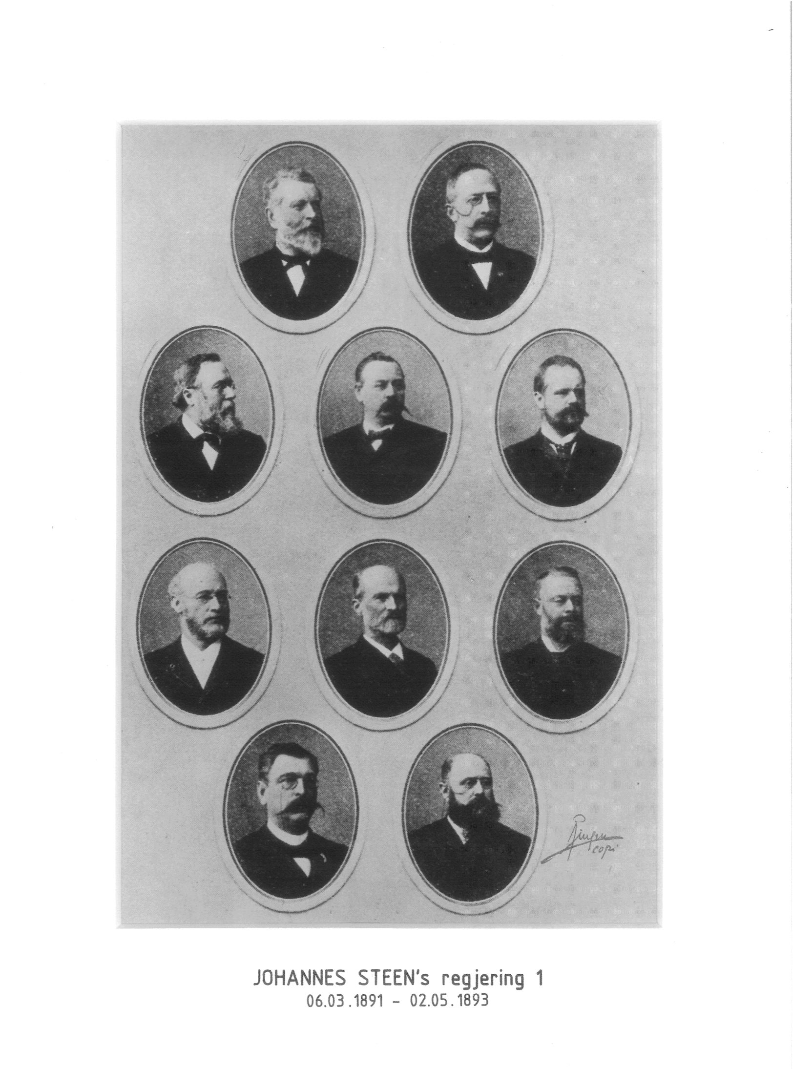 Johannes Steens første regjering (6. mars 1891 - 2. mai 1893).